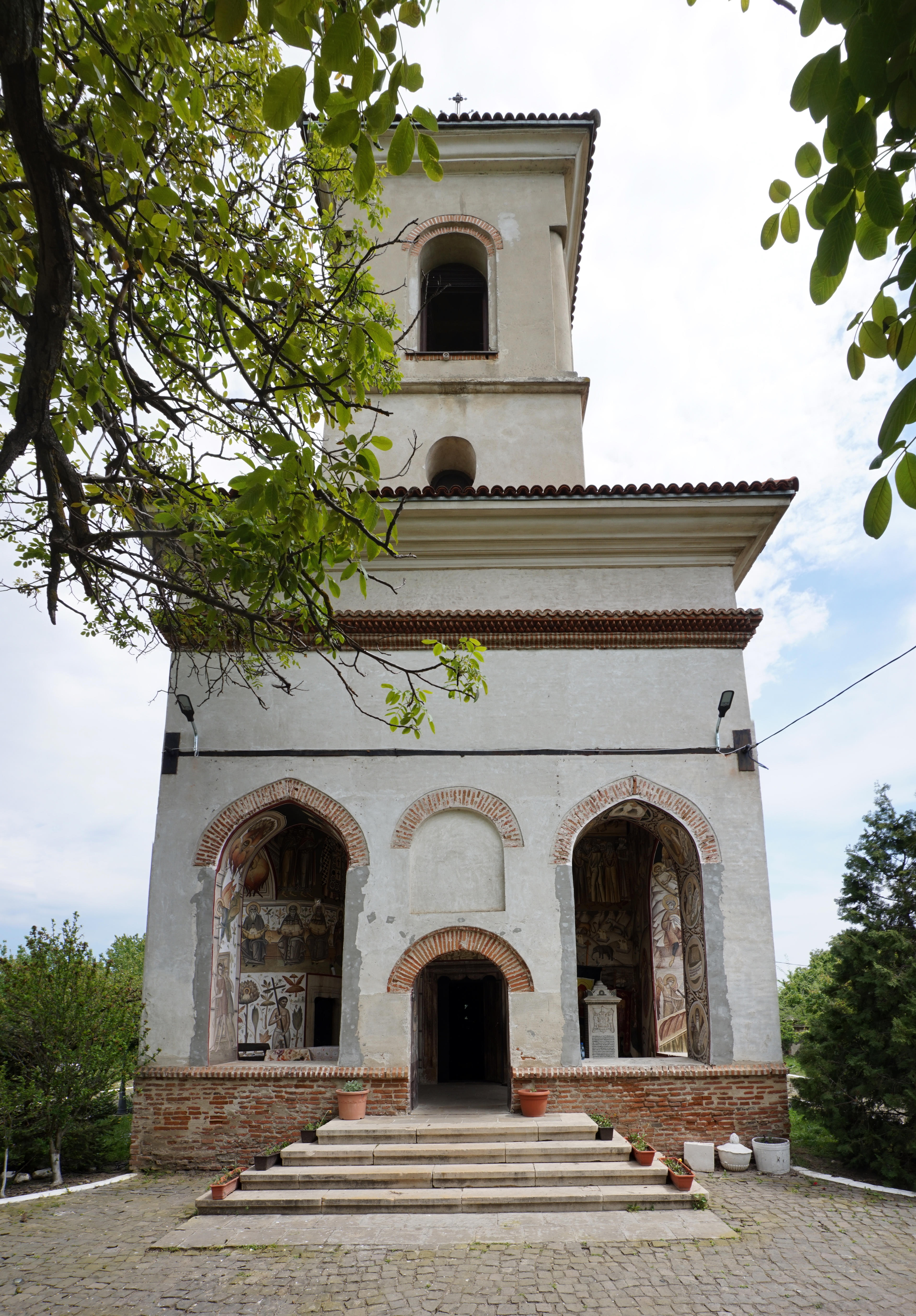 Biserica „Sf. Treime” din Herăști, cod LMI GR-II-m-A-15013.02. vedere dispre vest 02